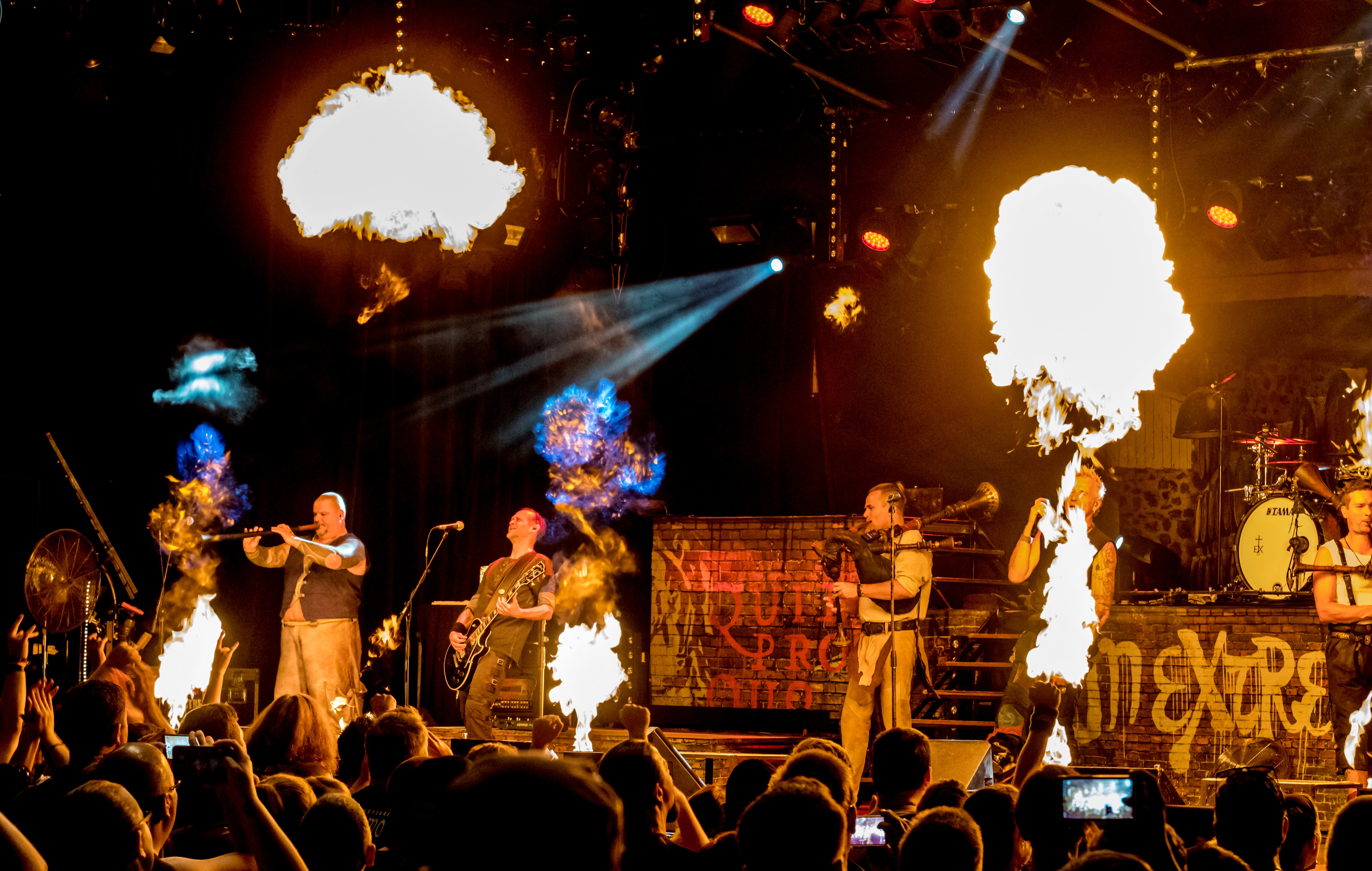 Bilder vom Zelt Musik Festival 2018 in Freiburg im Breisgau In Extremo am 29.07.2018 im Zirkuszelt